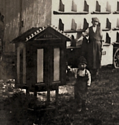 Bienenstockwaage